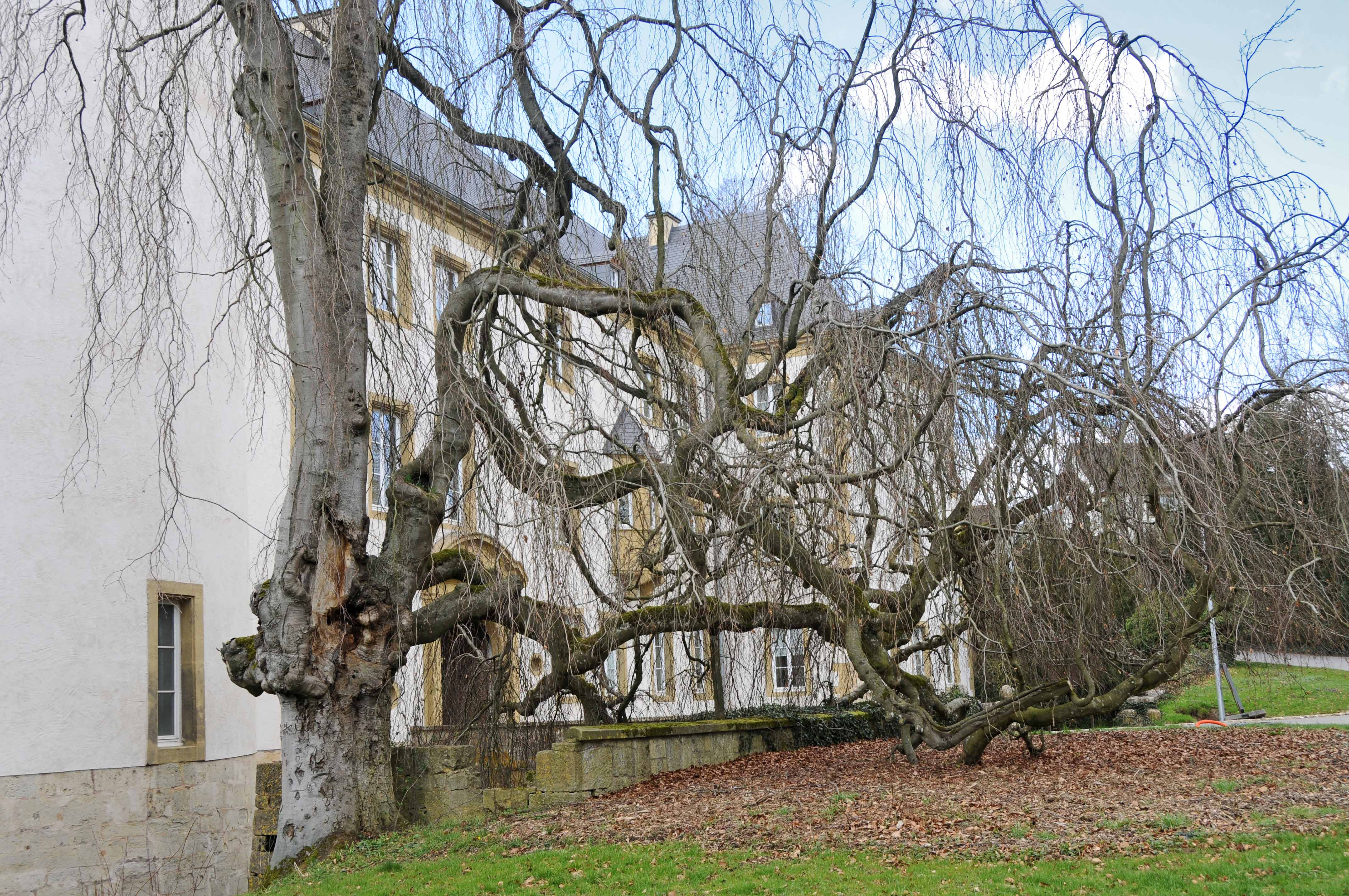 Trauerbuch zu Suessem.